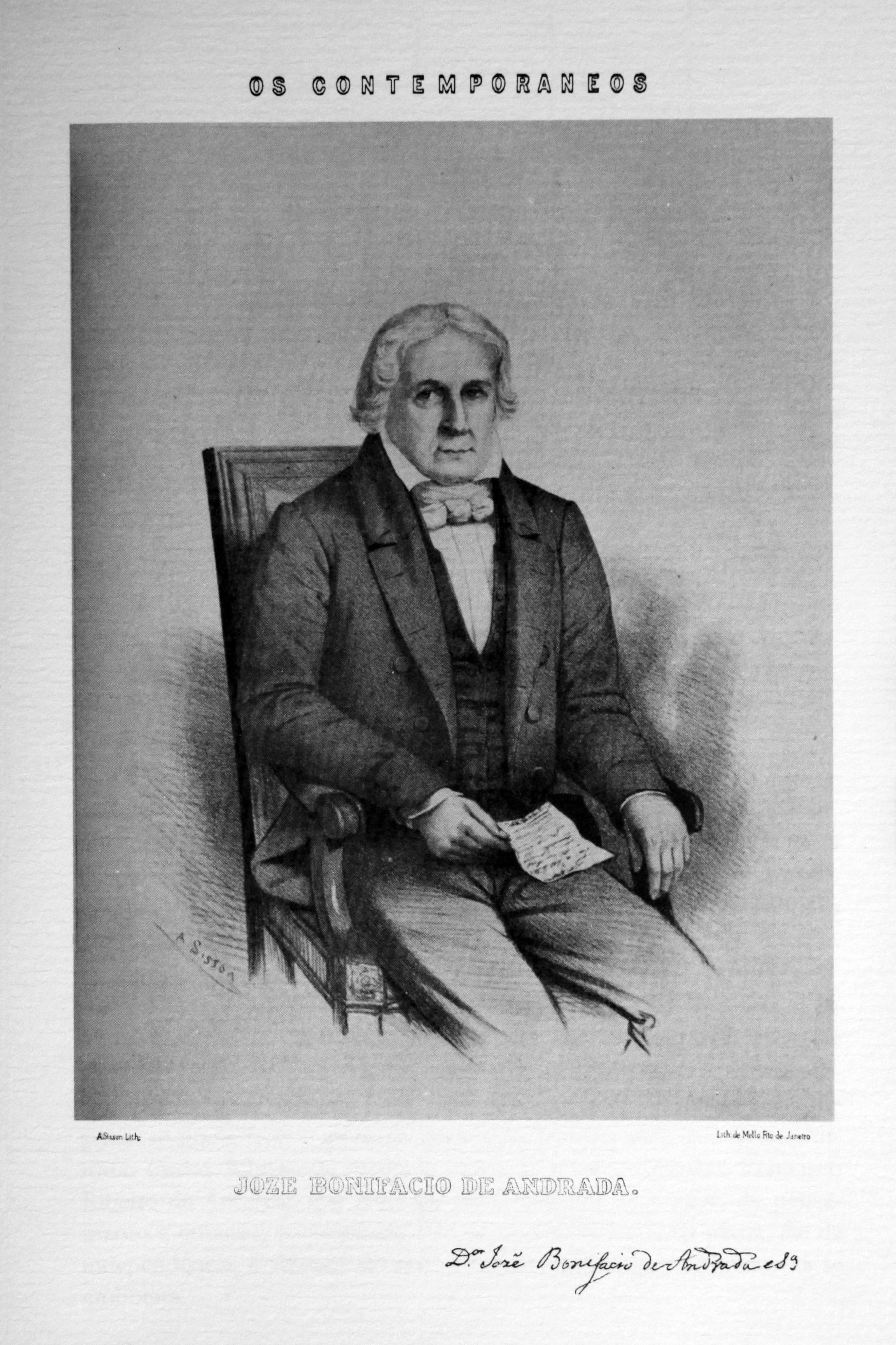 José Bonifácio de Andrada e Silva, retratado por Sébastien Auguste Sisson (1824-1893)